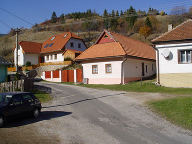 Obec úhorná